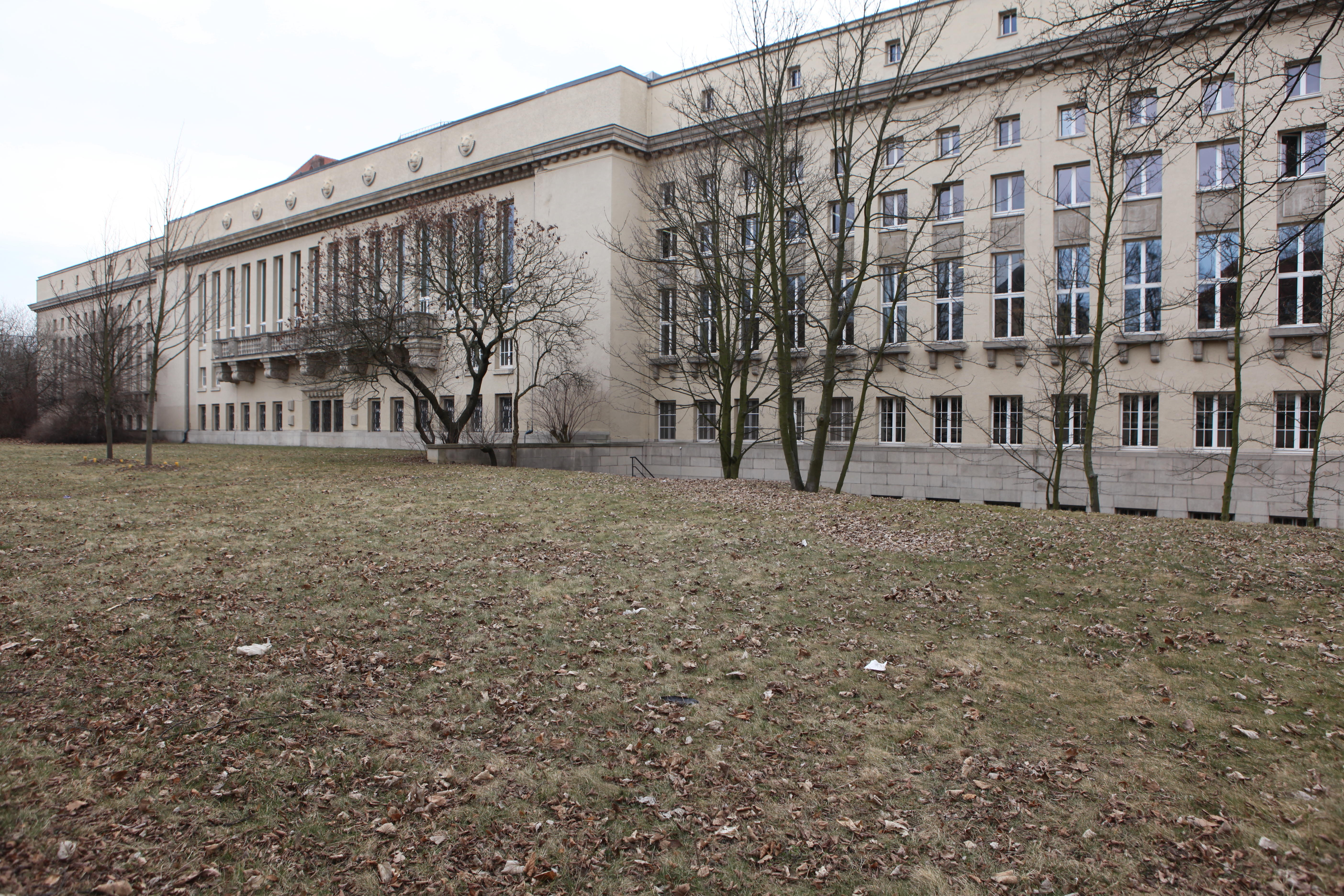 Deutsche Bücherei in Leipzig, Fassade Philipp-Rosenthal-Straße